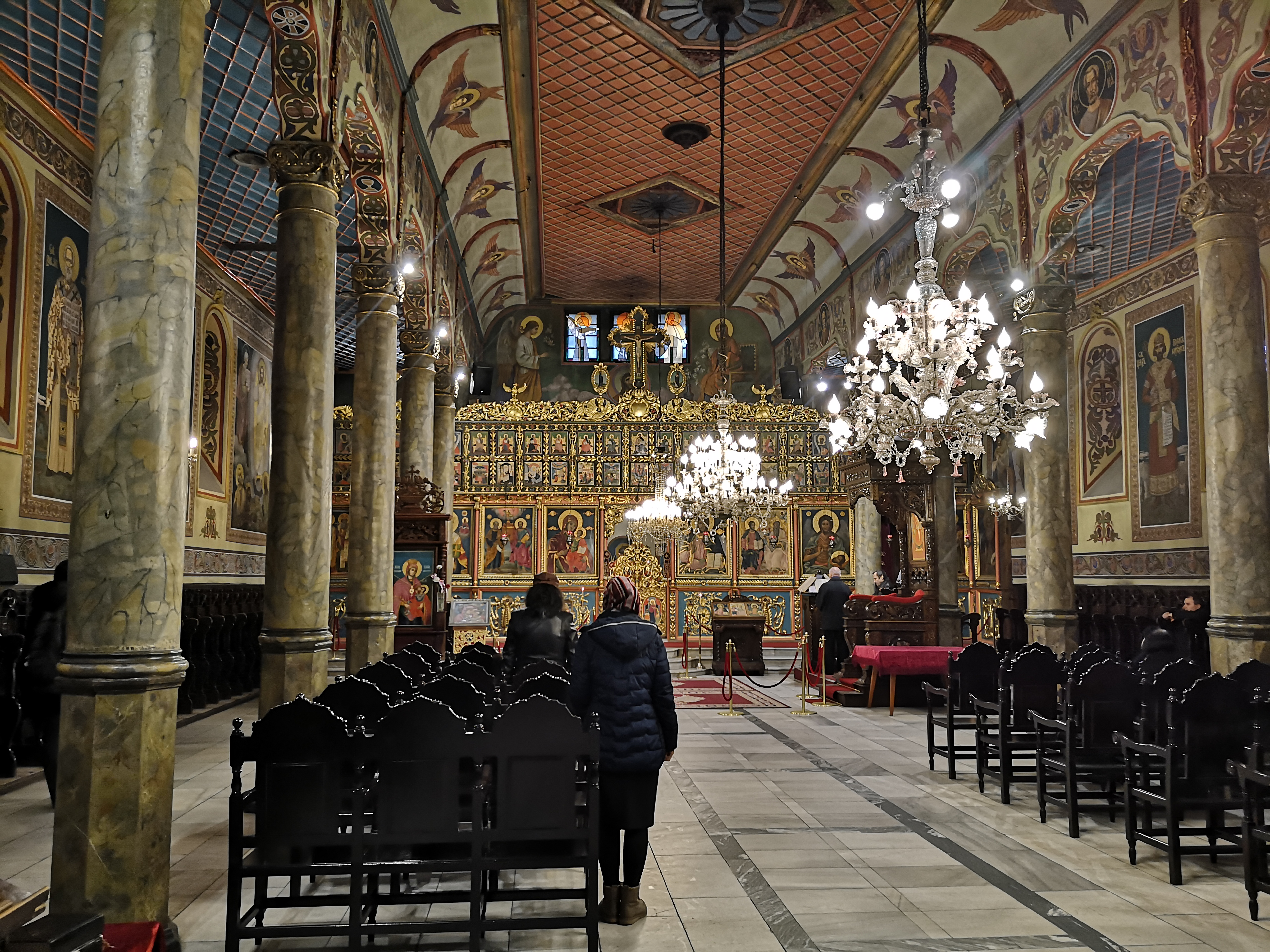 Wnętrze Soboru Trójcy Świętej w Ruse z trzy rzędowym ikonostasem